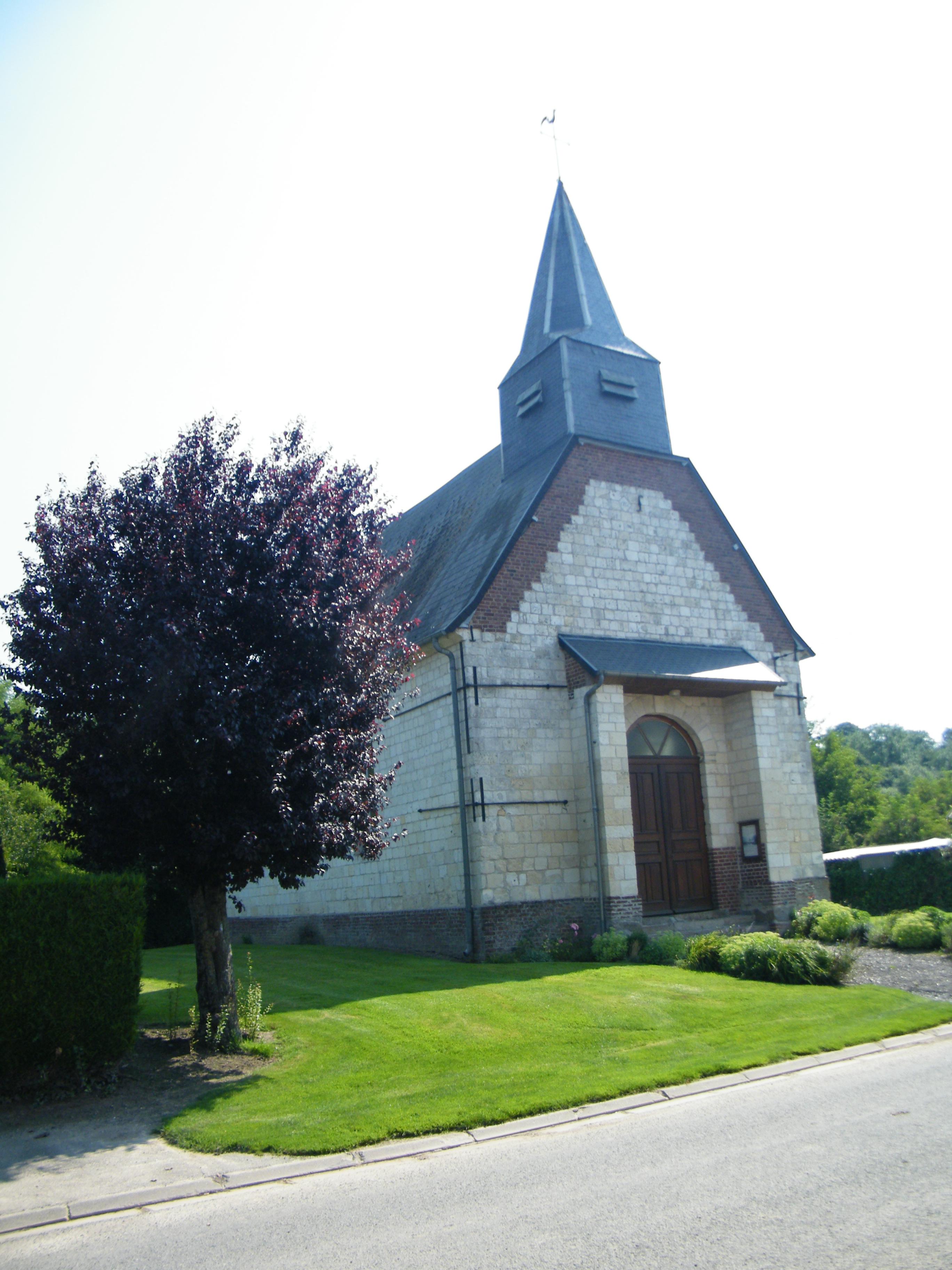 église.